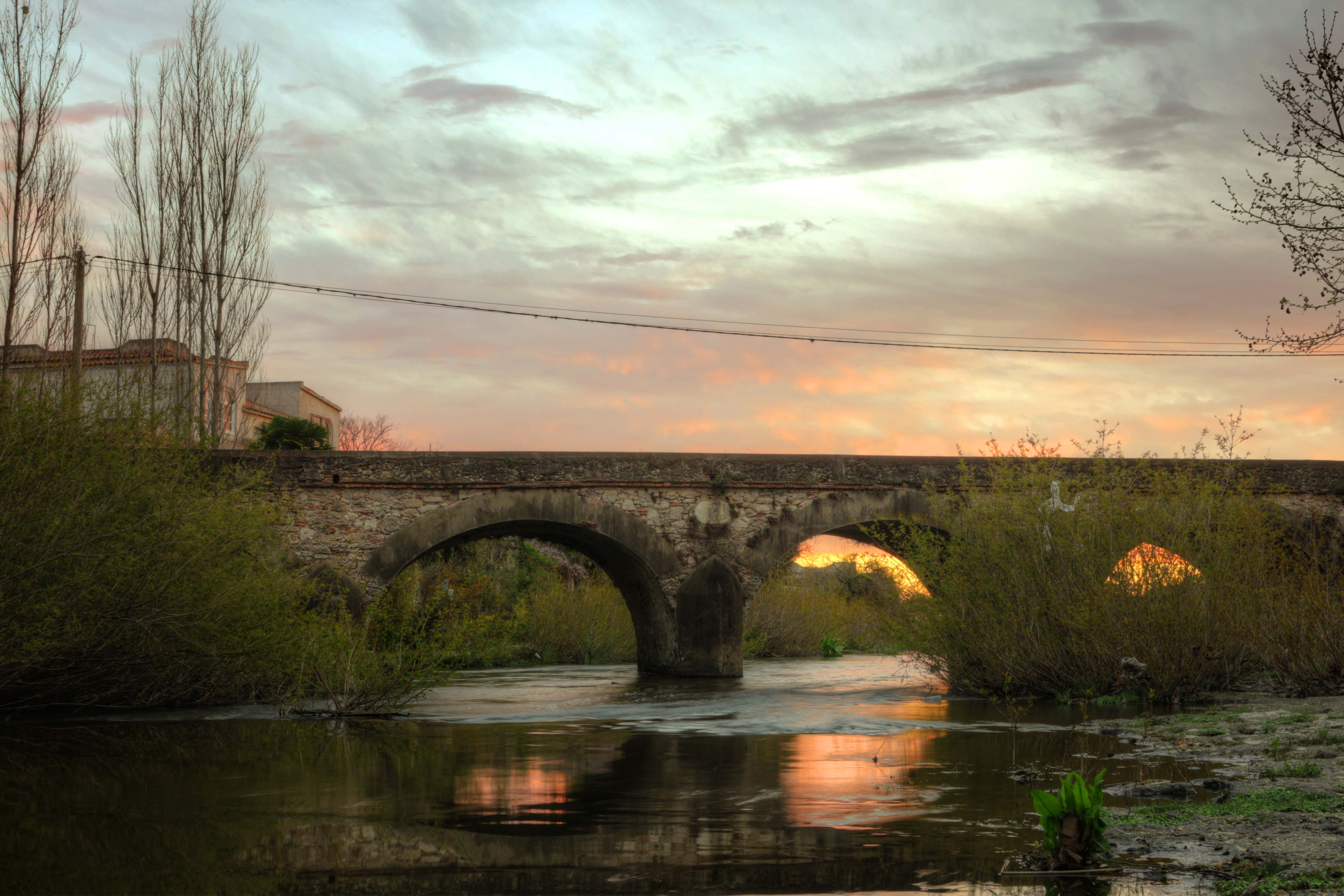 Puente Castells y Molino. Ubicada en el departamento de Colonia